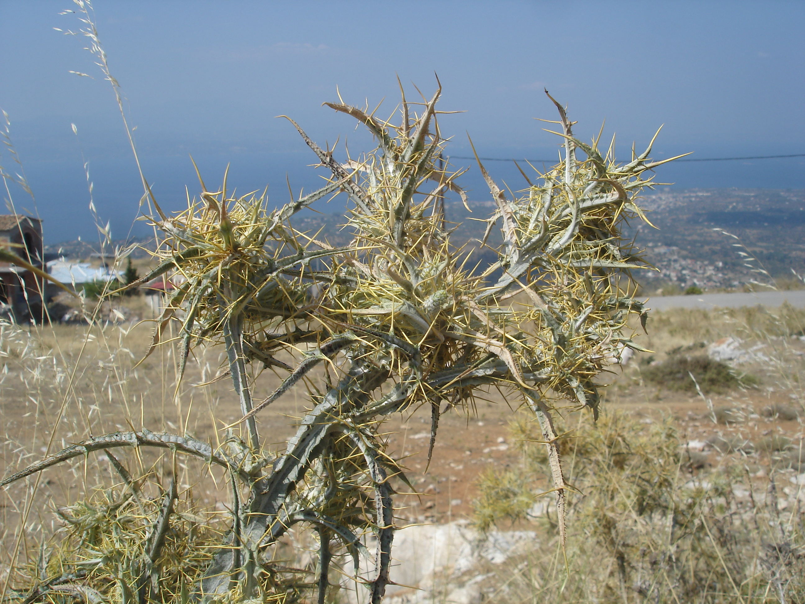 Chardon sur la colline de l'arrière pays de la ville d'Amarinthos sur l'ile d'Eubée (Greece).